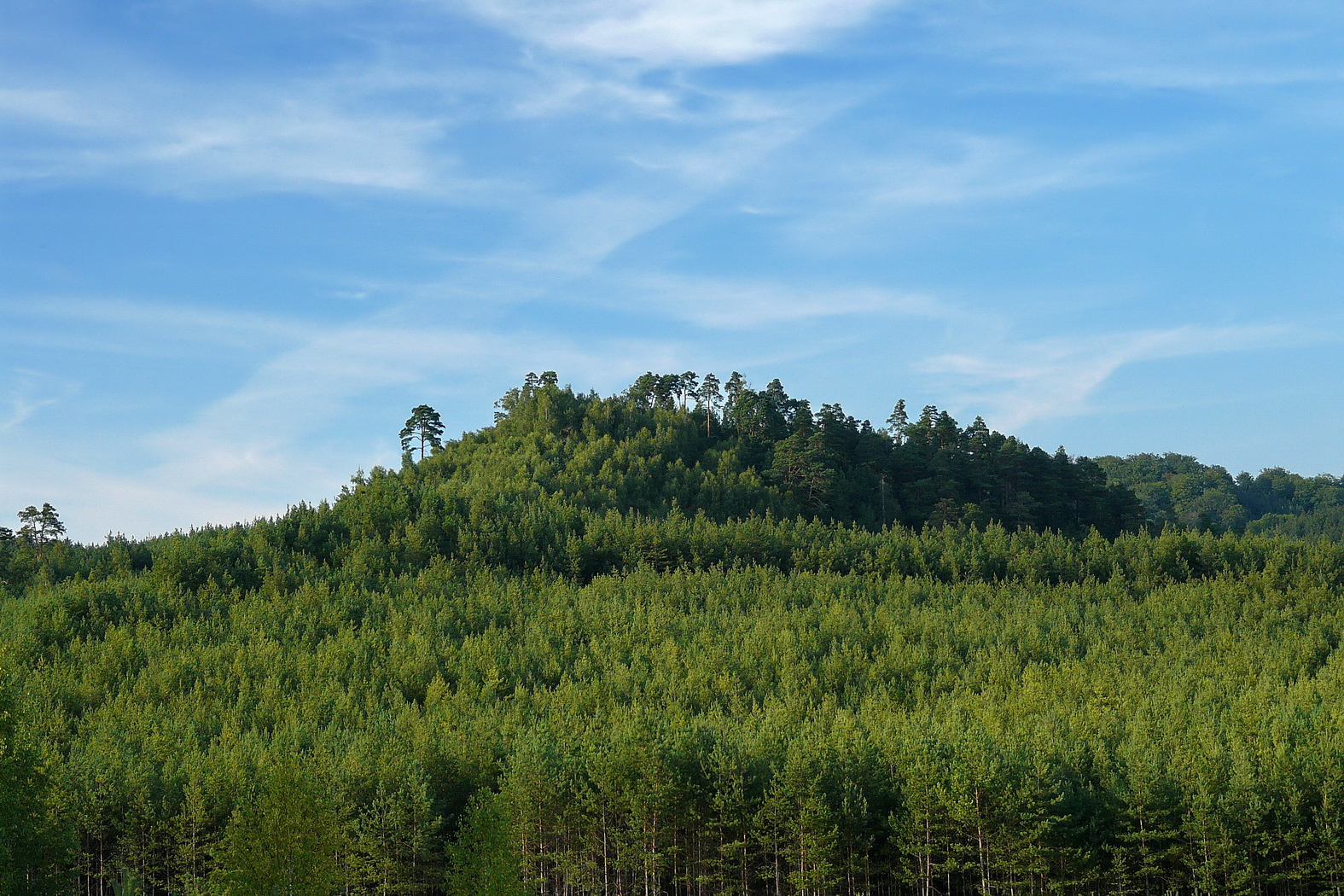 Havířský vrch od jihozápadu